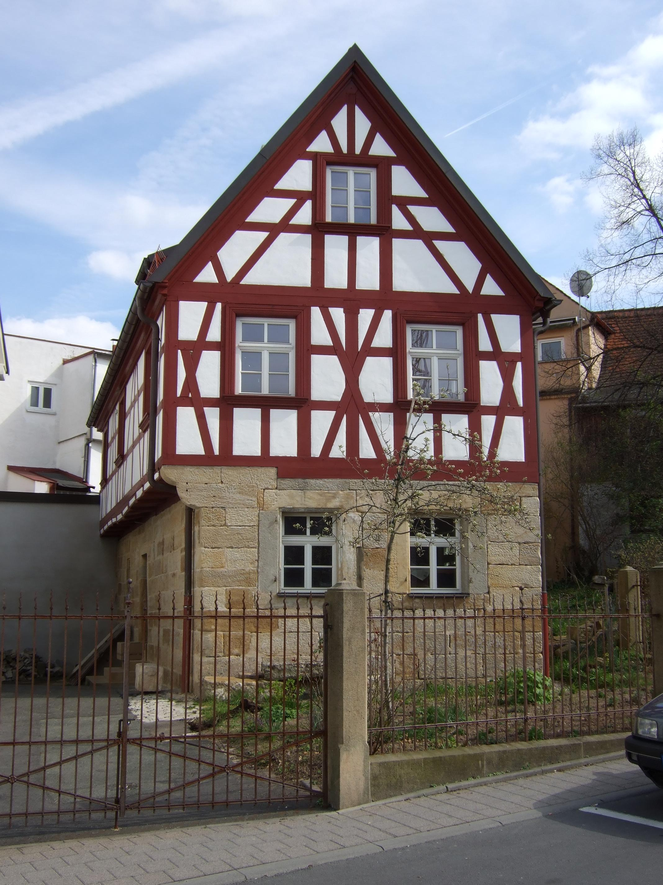 Fachwerkhaus Bayreuth Münzgasse 15